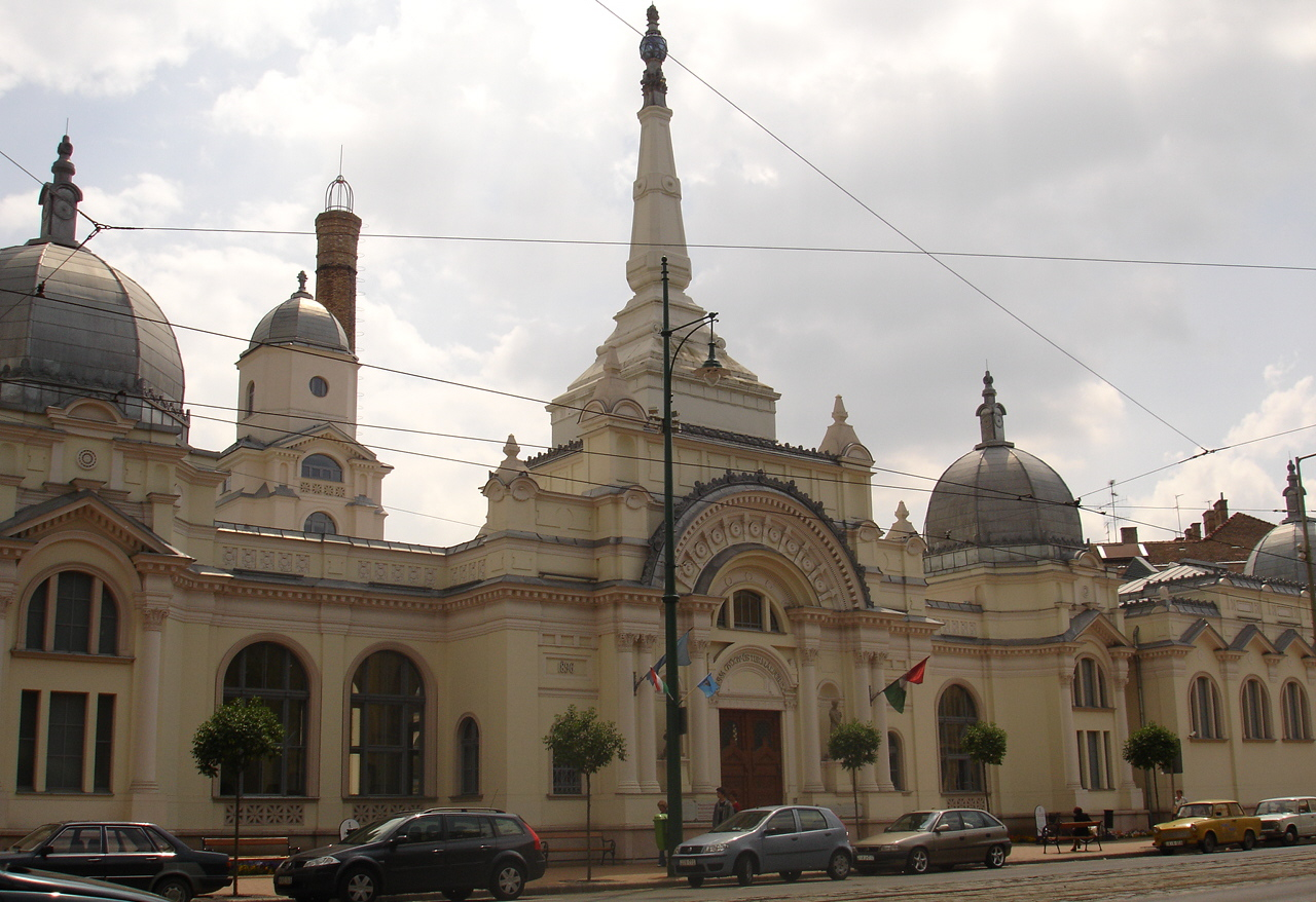 Szegedi gőzfürdő épületének felülvilágító tetőszerkezet munkái. Készült ~ 1894 This is a photo of a monument in Hungary. Identifier: 11269